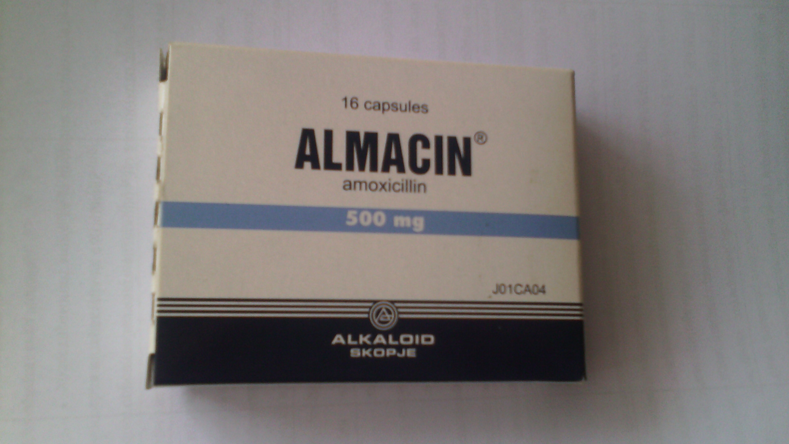 Алмацин (амоксицилин) капсули од 500 mg произведени од Алкалоид